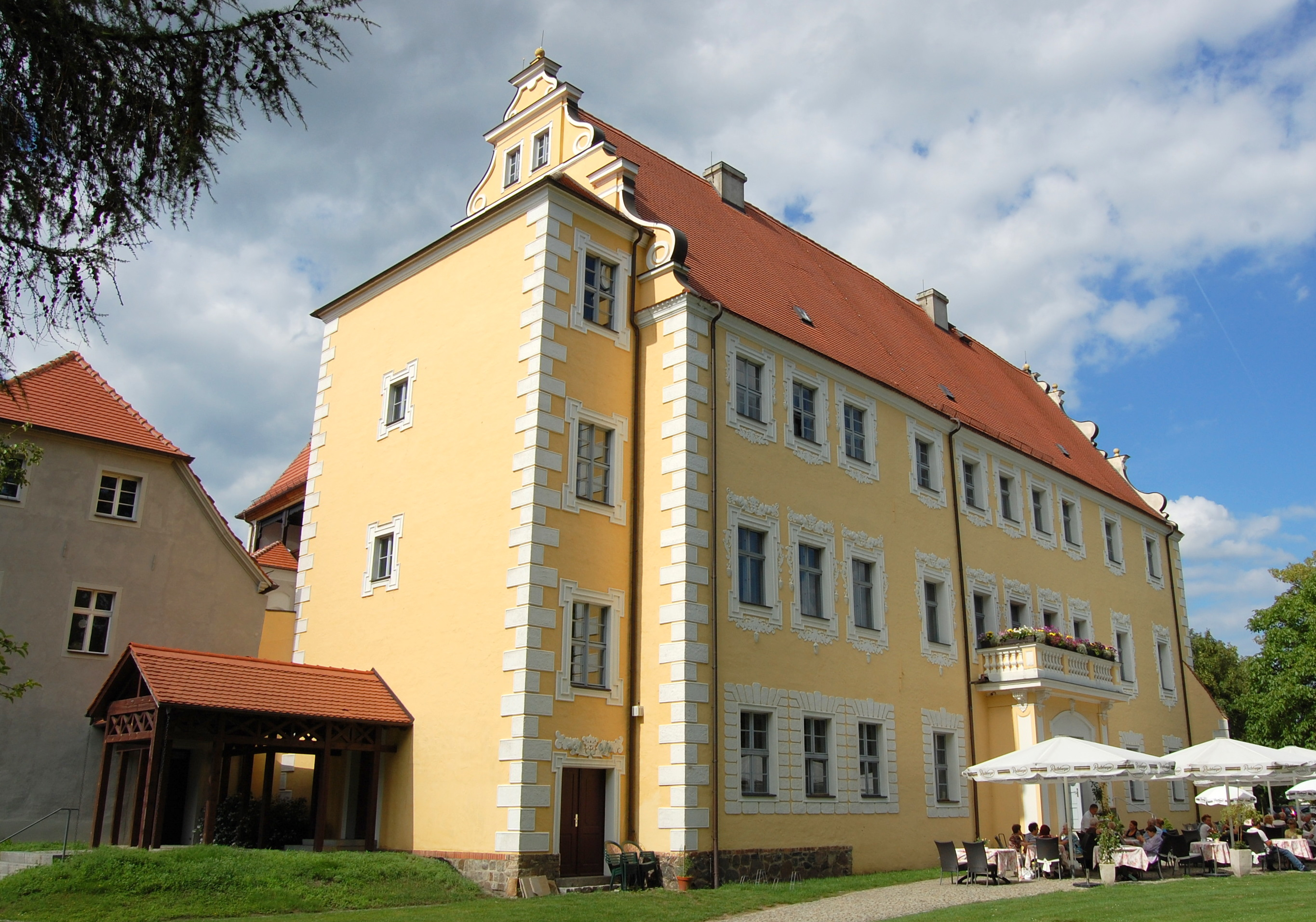 Schloss Lübben, Südseite